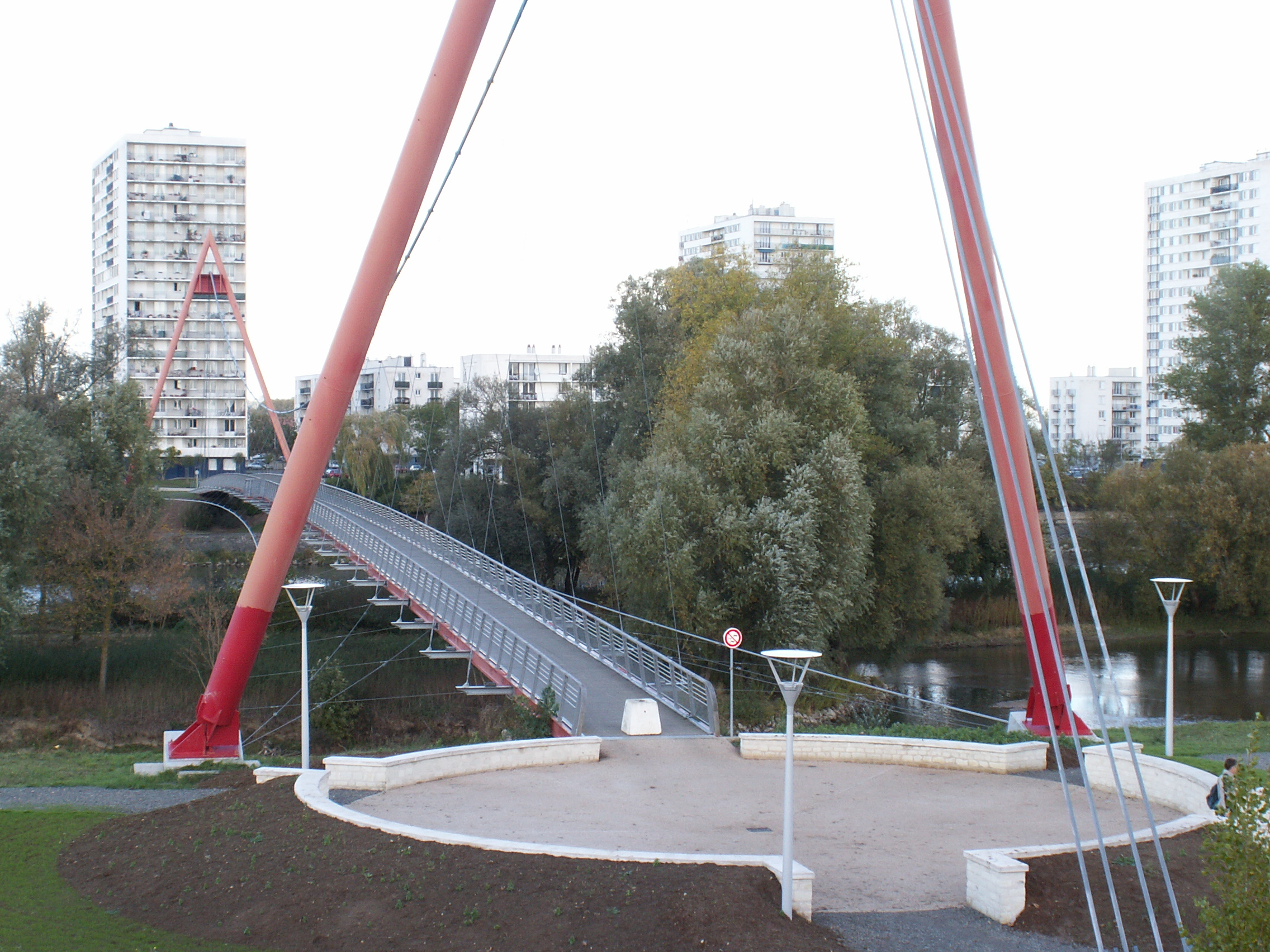 Passerelle sur le Cher, "Le Fil d'Ariane" à Tours, vu depuis le quartier des Deux-Lions. En arrière plan, on voit les immeubles du quartier des Rives du Cher.